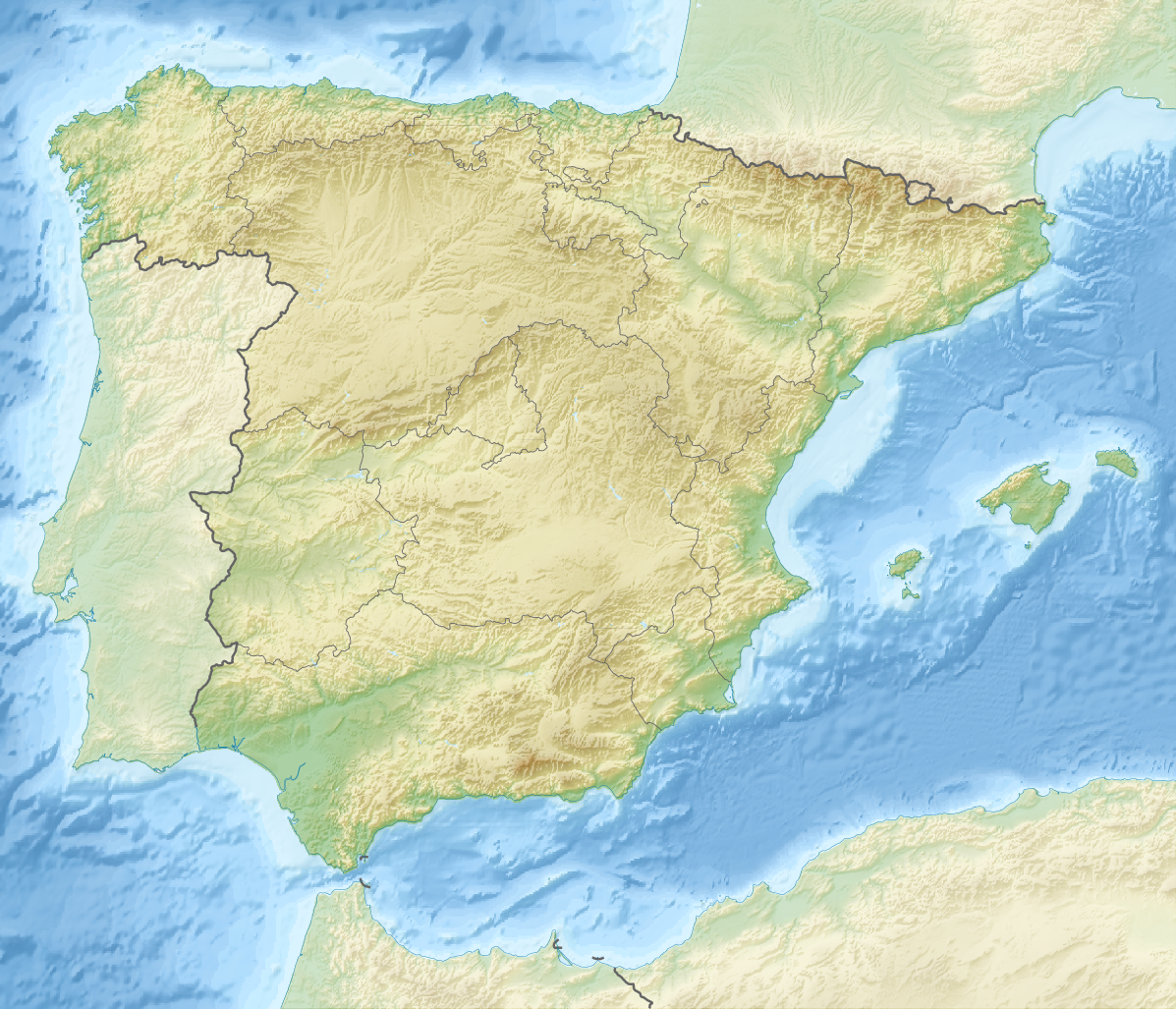 Karte Spanien Equirectangular projection, N/S stretching 130 %. Geographic limits of the map: N: 44.4° N S: 34.7° N W: 9.9° W E: 4.8° E